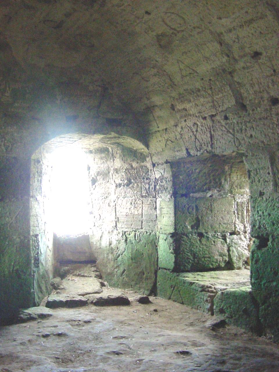 Regimento de Guarnição nº 1, Fortaleza de São João Baptista, Interior do Torreão da Bandeira, Monte Brasil, ilha Terceira, Açores, Portugal.